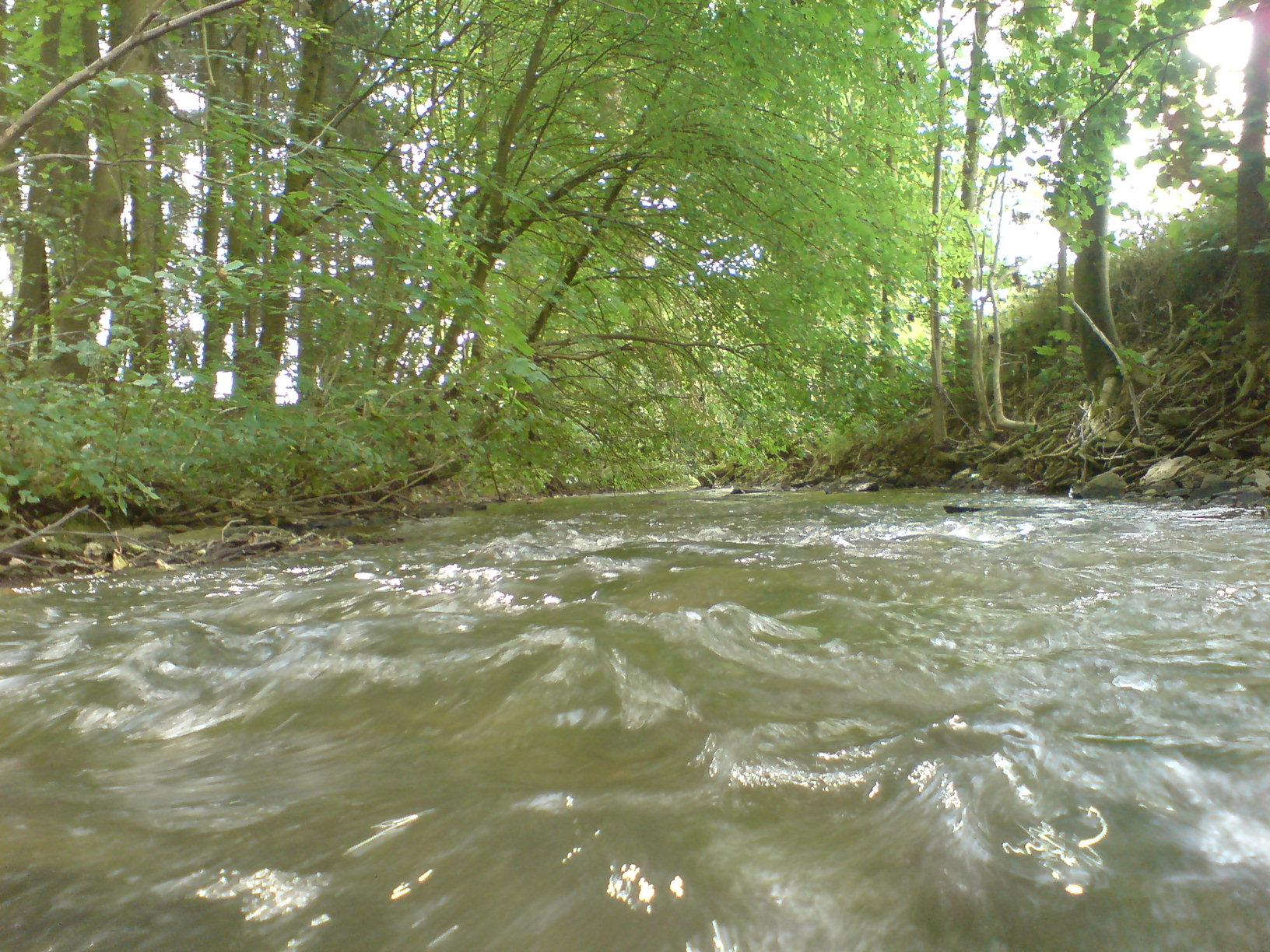 Die Schefflenz. Aufnahme im unteren Schefflenztal kurz vor der Mündung.